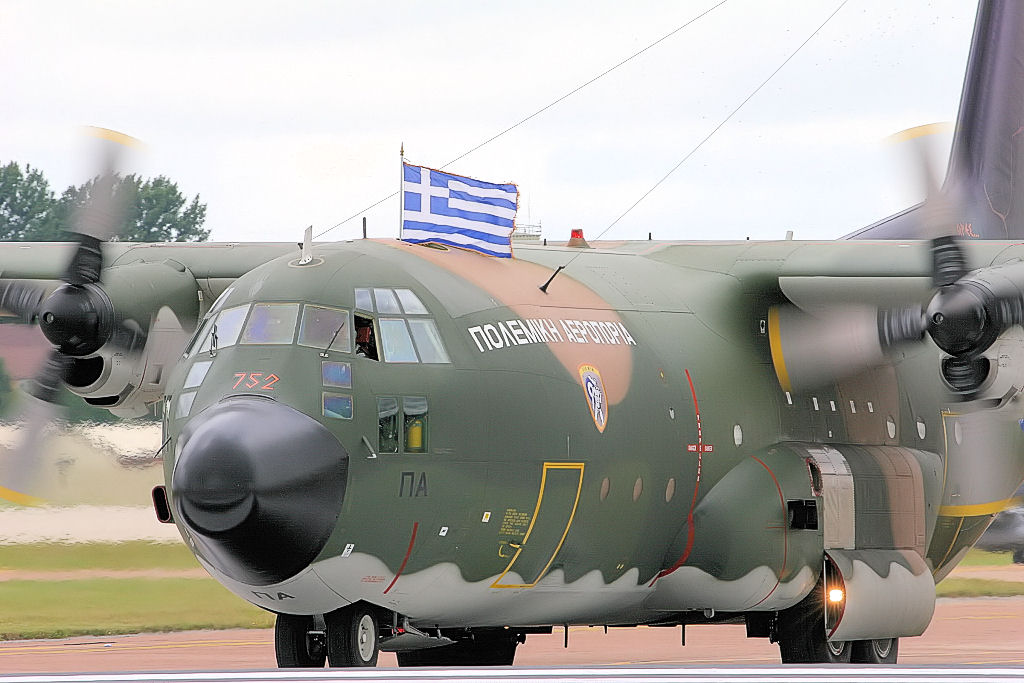 C130 Hercules - RIAT 2007